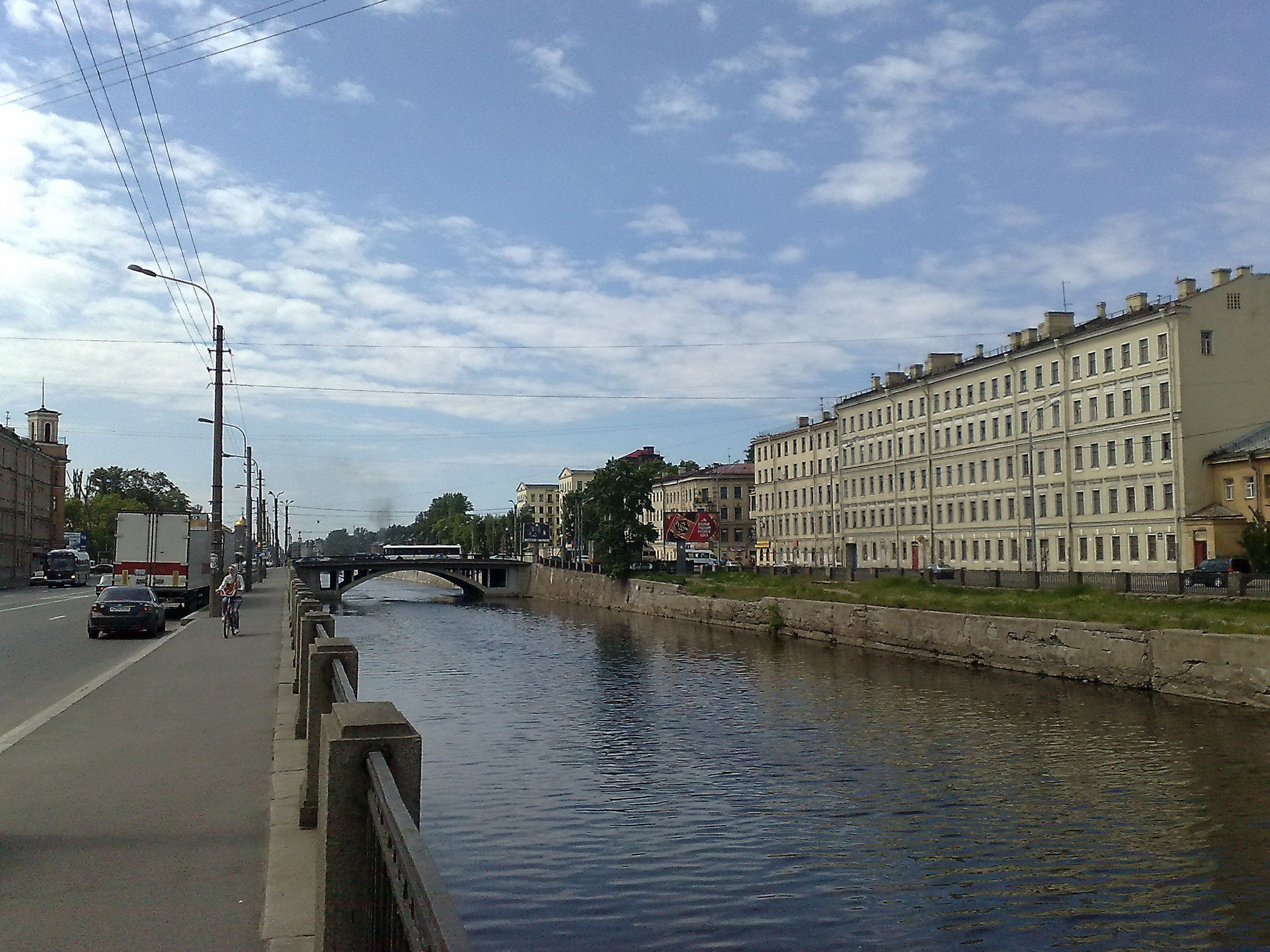 Обводный канал в Петербурге